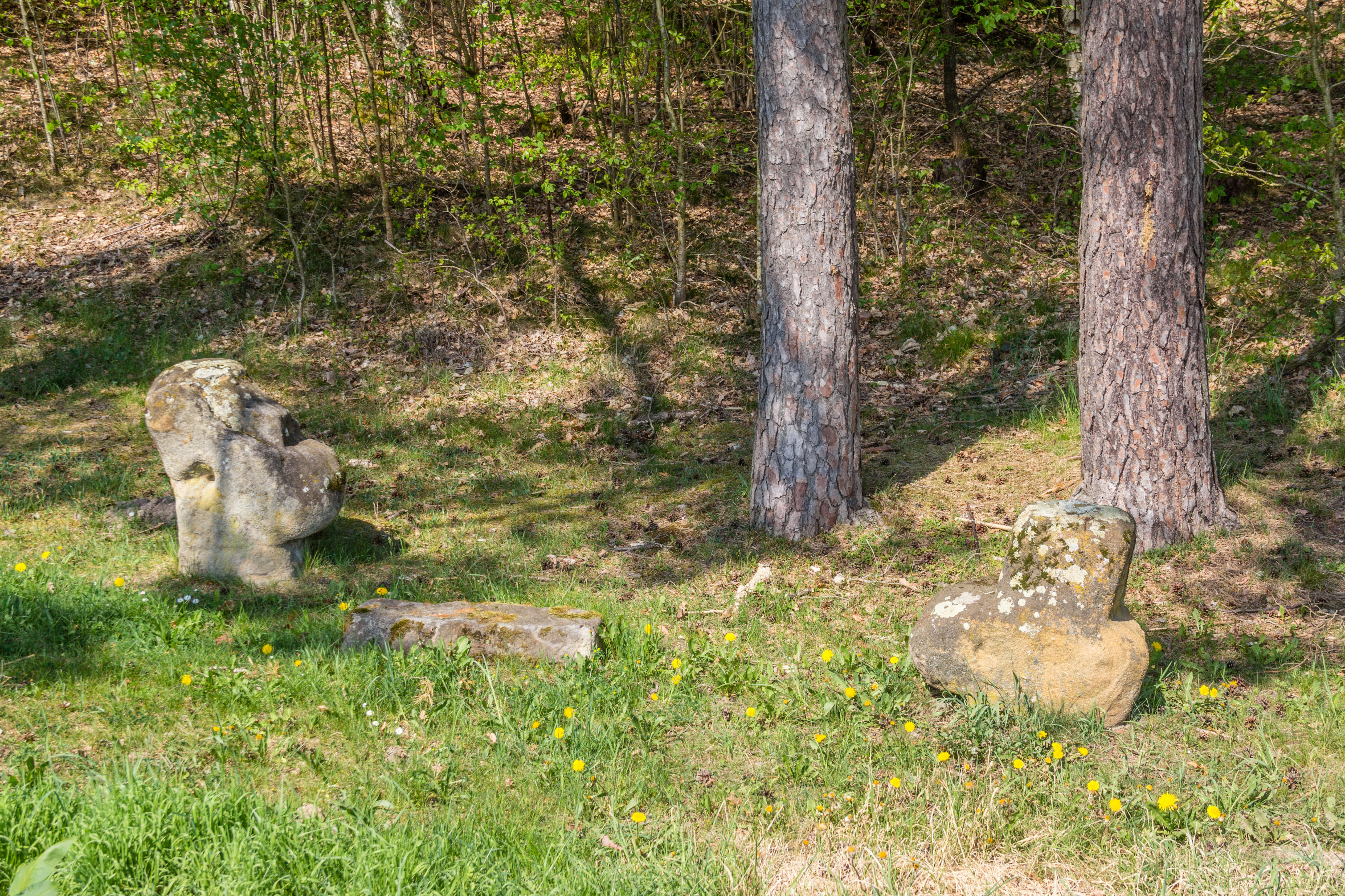 Steinkreuze, Lauf an der Pegnitz, Simmonshofen am Höllweiher, Sicht auf den Standort